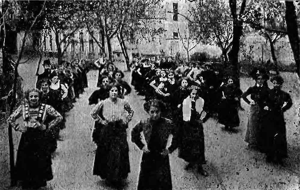 Prywatne Gimnazjum Żeńskie z prawem publiczności Zofii Strzałkowskiej. Gimnastyka uczennic (ok. 1911).